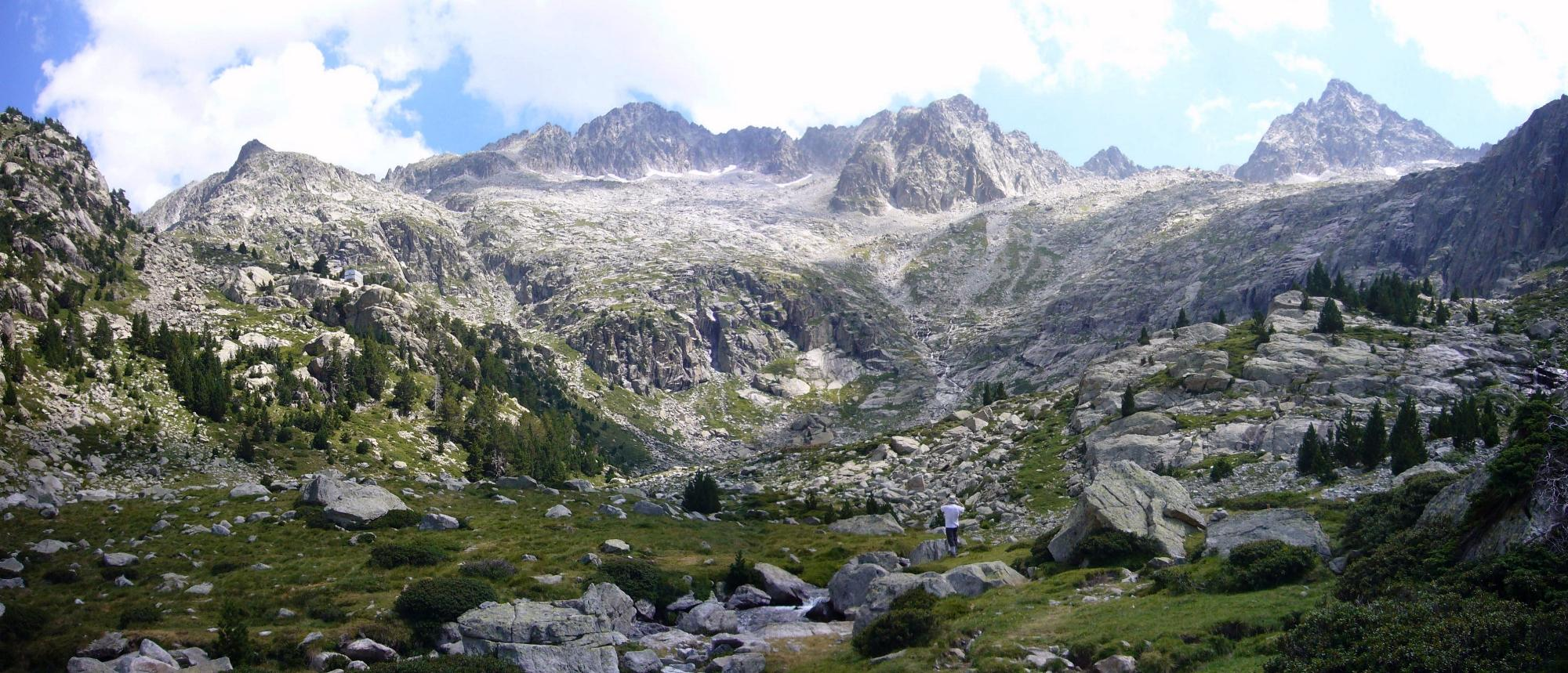 Massís de Besiberri vist des de la Vall de Besiberri; Vilaller, Alta Ribagorça, Catalunya